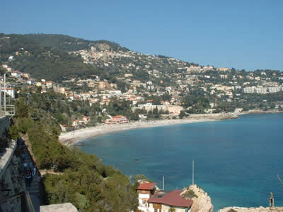 Le vieux village de Roquebrune-Cap-Martin